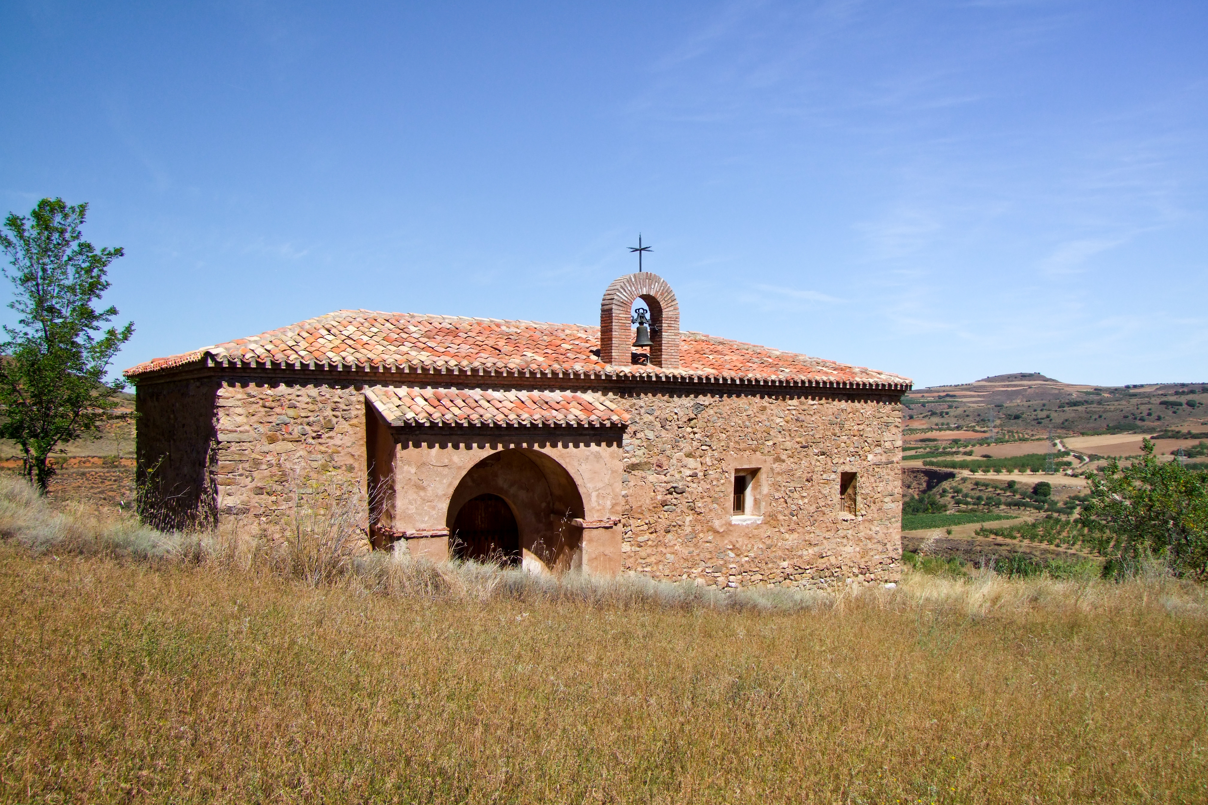 Ermita de la Virgen del Prado en la localidad de Jubera, La Rioja - España